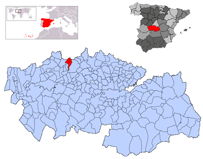 Pelahustán en la provincia de Toledo